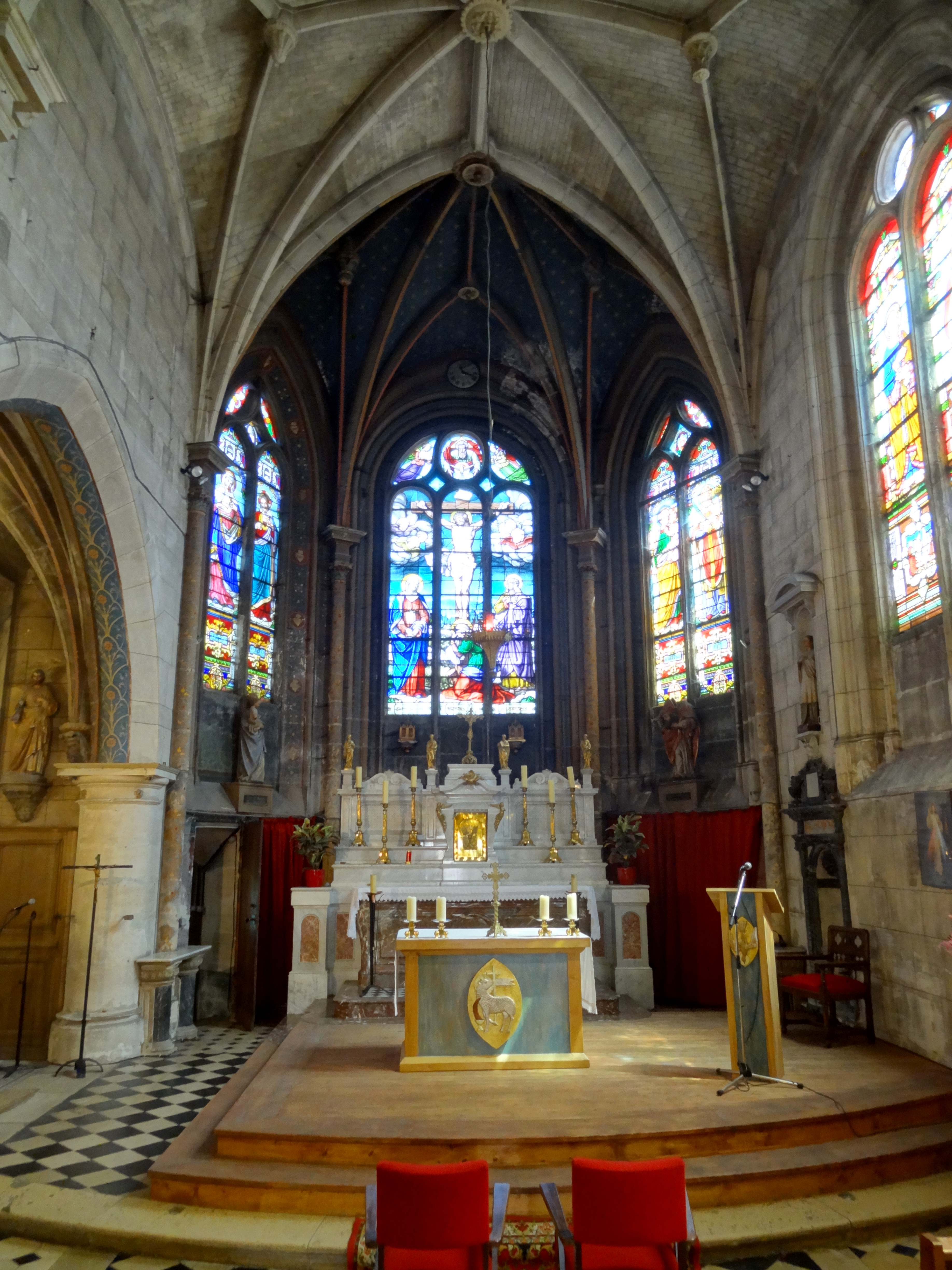 Intérieur de l'église - voir titre.